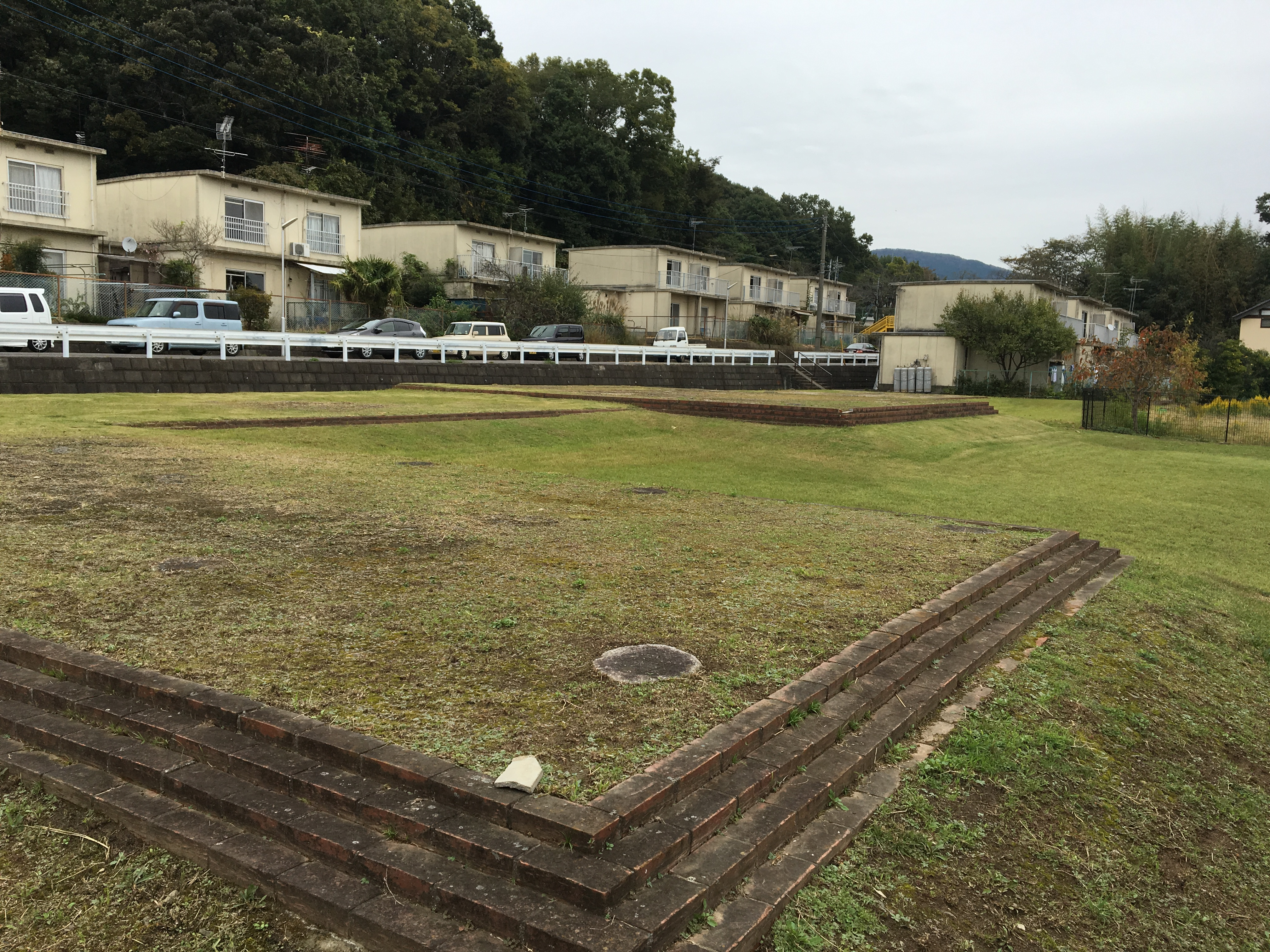 つくば市北条にある日向廃寺跡